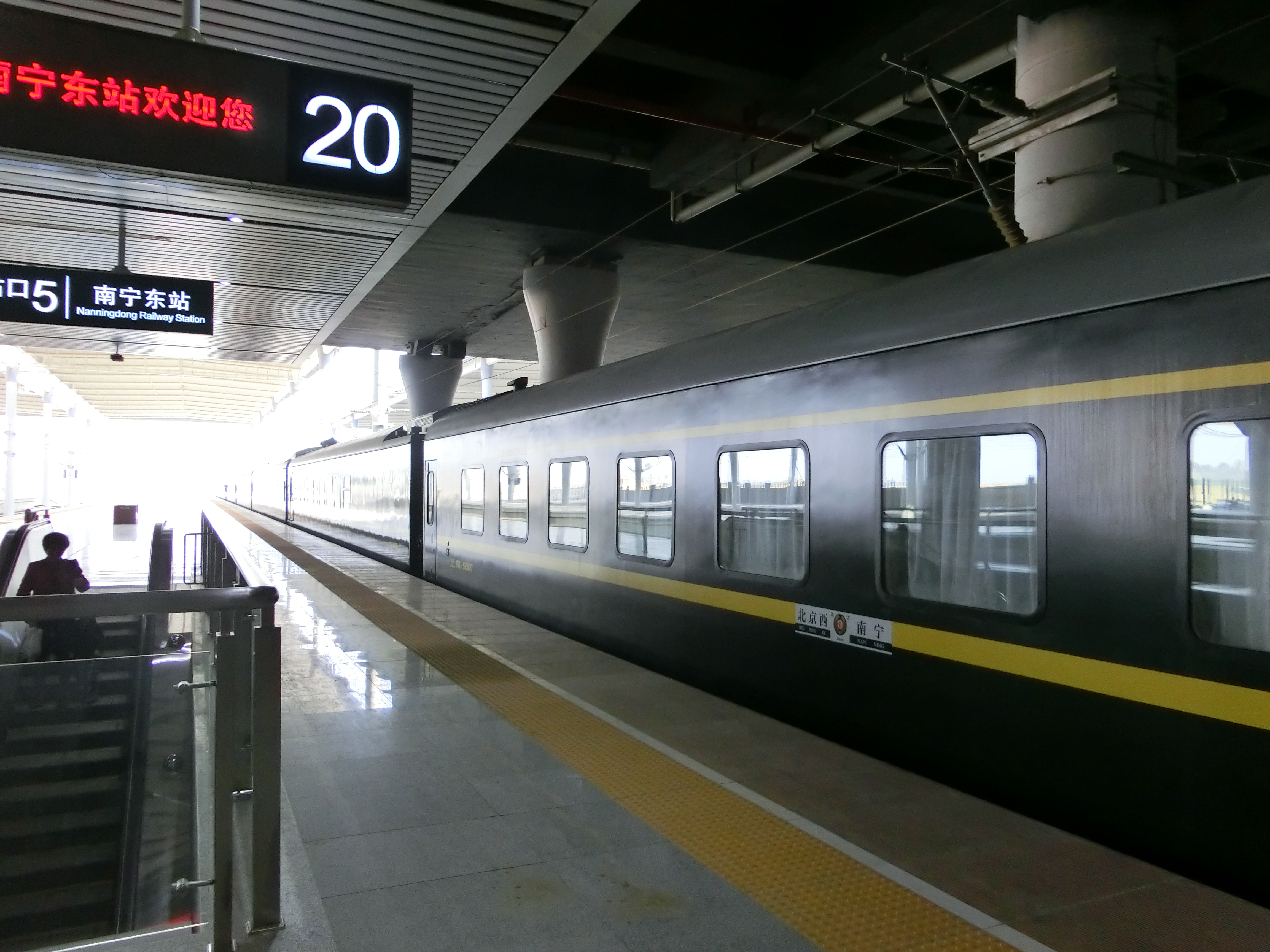 Z286次从南宁东站使出